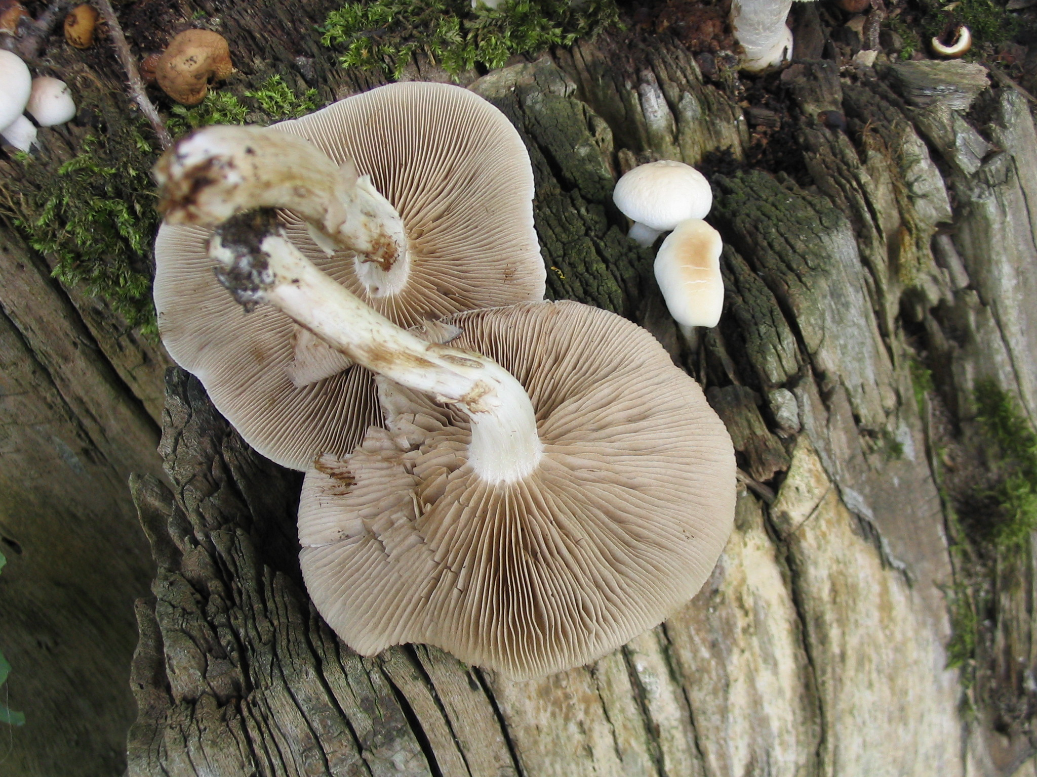 Südlicher Ackerling (Agrocybe aegerita oder A. cylindracea) fotogrpahiert von Dr. Hagen Graebner, am 24.07.2004, Rheinauen bei Ingelheim